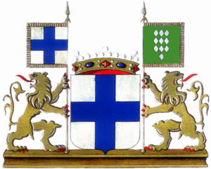 Wapenschild van Moorslede